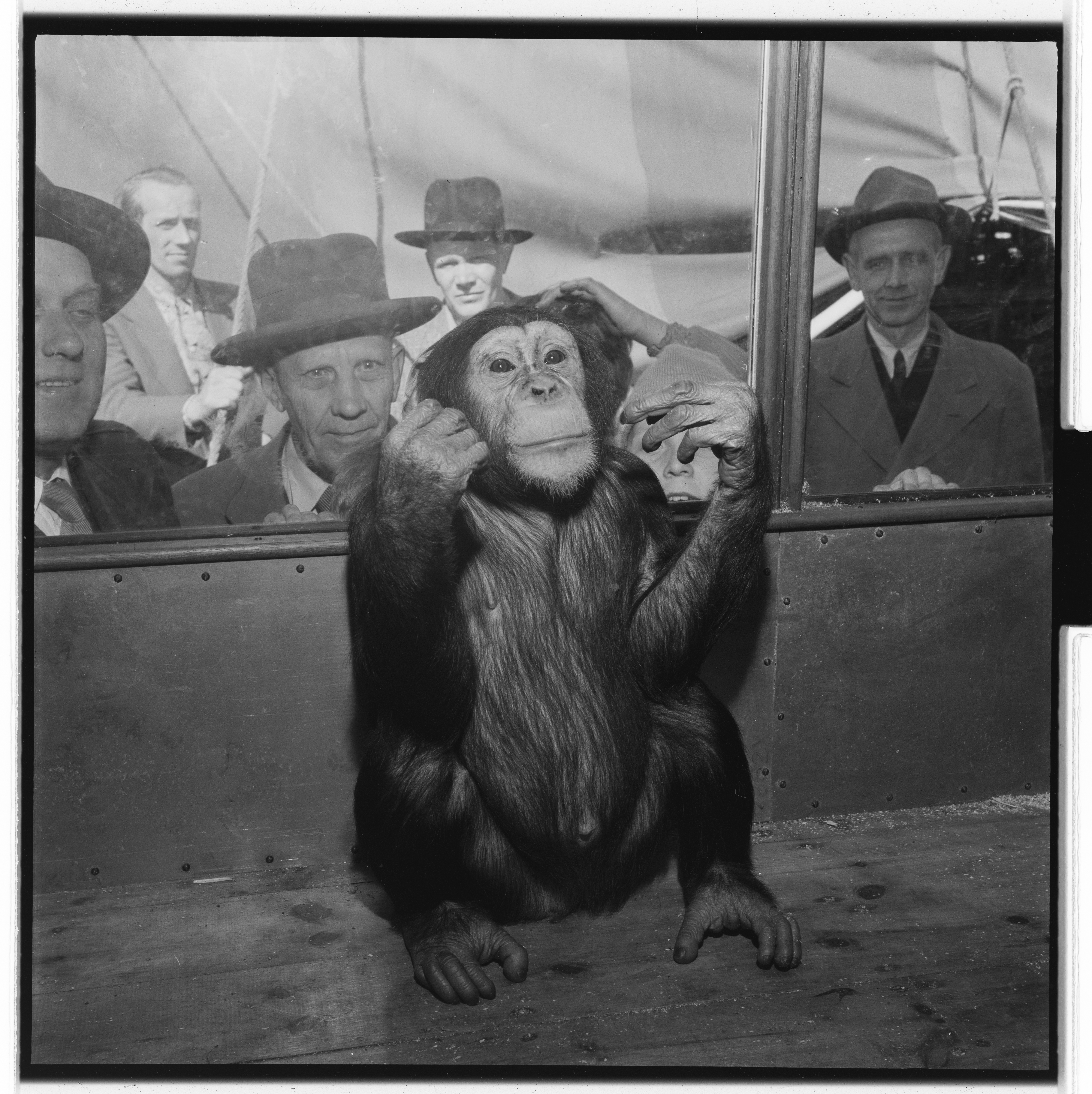 Bildet er hentet fra Arkivverket. Sjimpanser ved Cirkus Berny Arkivinstitusjon : Riksarkivet Arkivnavn : Billedbladet NÅ Sted : Norge, Ukjent, Ukjent, Ukjent Emneord: Circus, Sjimpanser, Underholdning, Dyr Avbildet